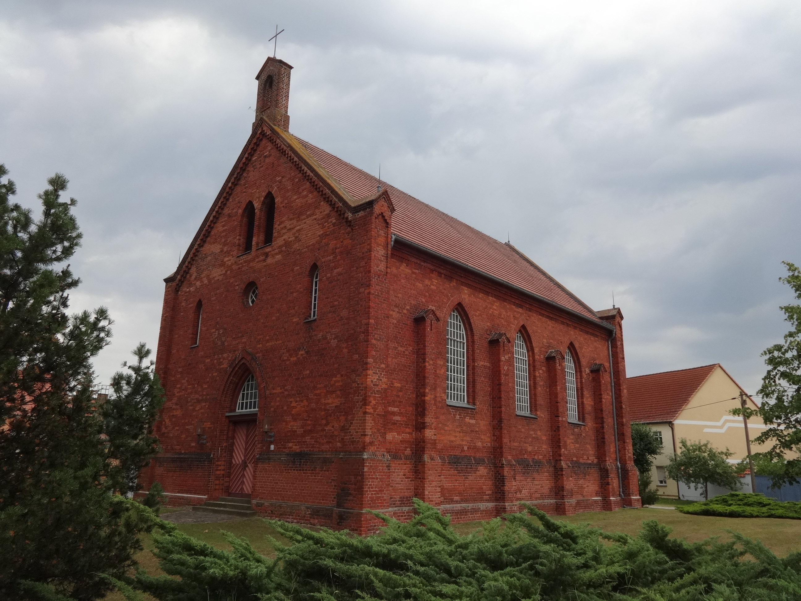 Die Dorfkirche Liebätz ist ein neugotischer Backsteinsaal mit einem Dachtürmchen auf dem westlichen Giebel aus dem Jahr 1856. Die Ausstattung ist neuzeitlich.